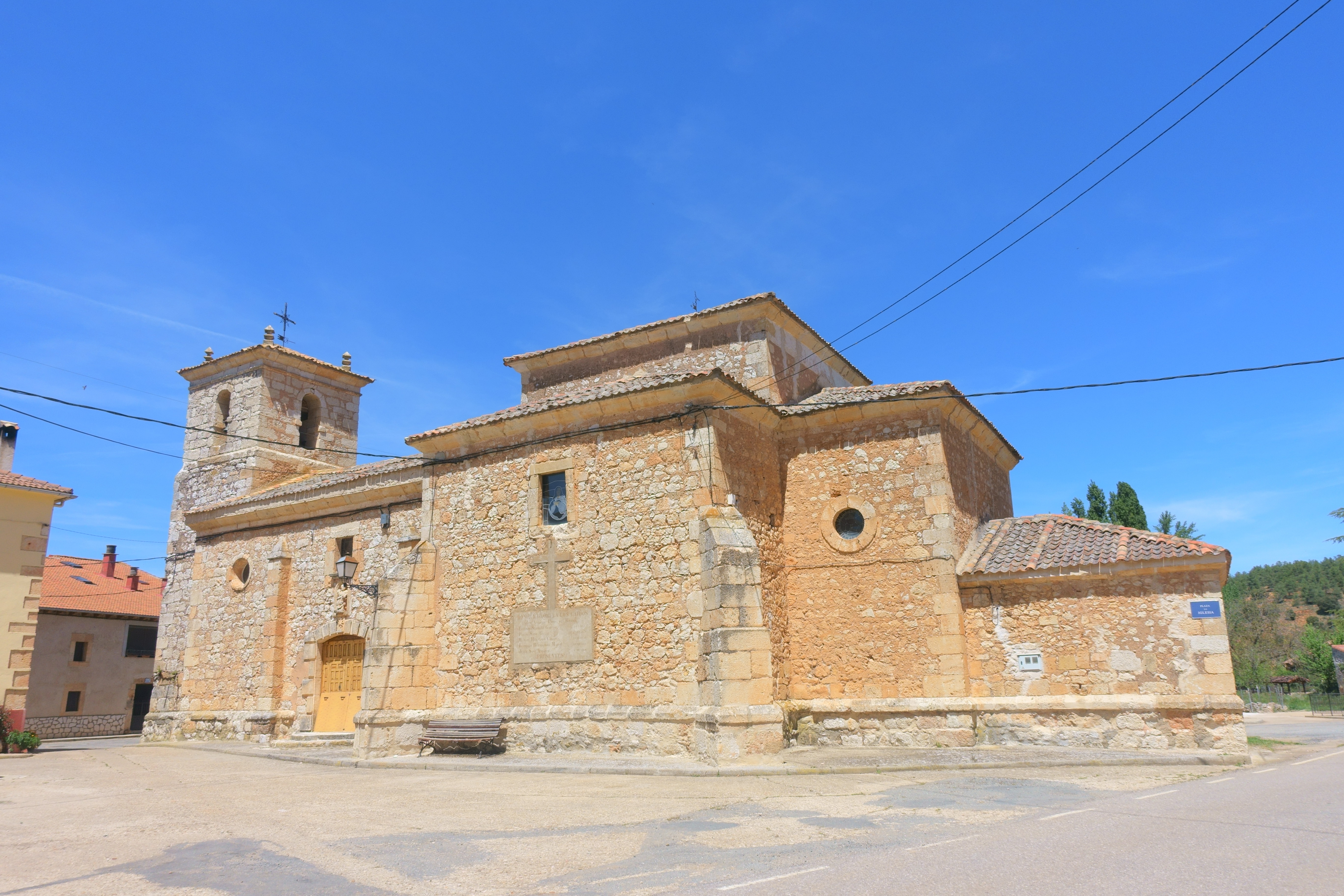 Iglesia de San Pedro, Aldehorno (Segovia, España).